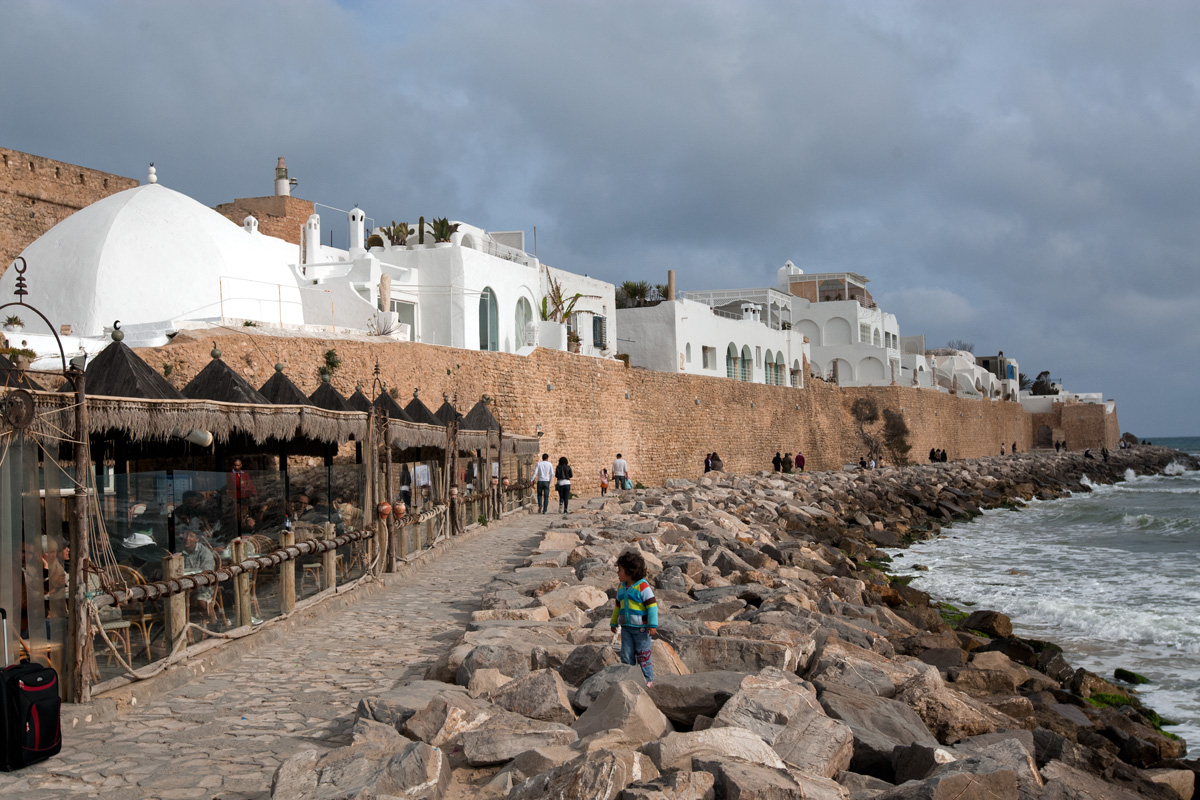 Medina w Hammamecie